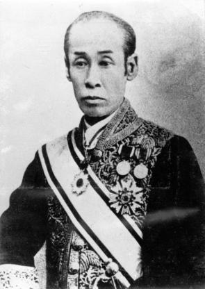 池田章政（第14代岡山城主）、Ikeda Akimasa(the 14th Okayama castellan)